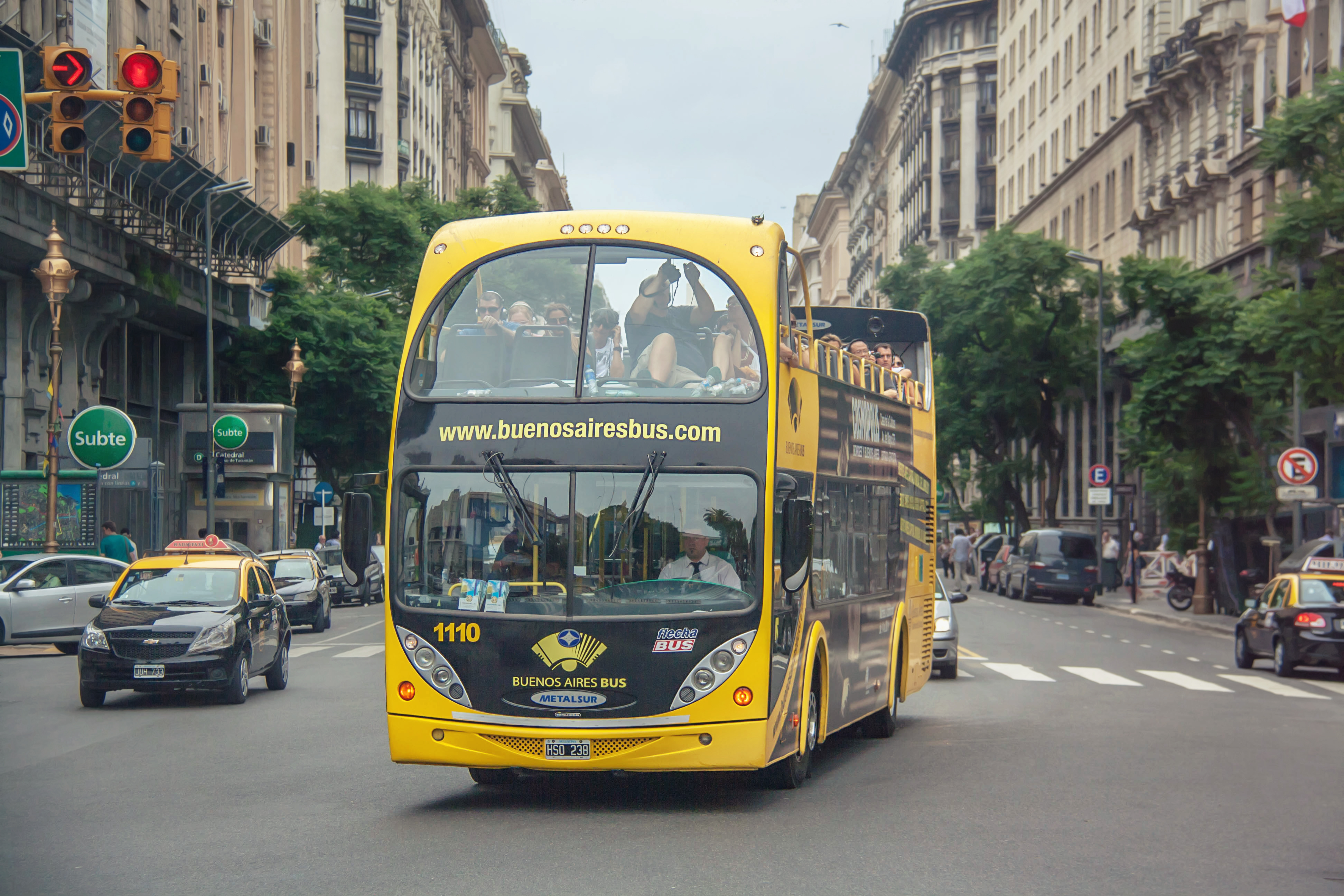 Buenos Aires, Argentina